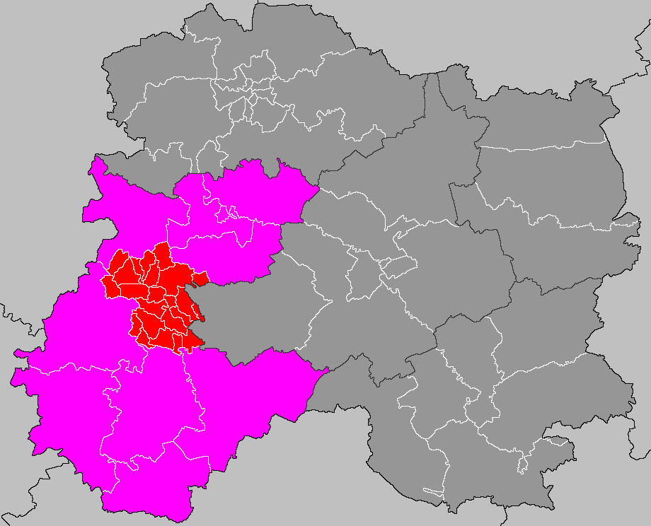 Localisation du canton de Montmort-Lucy